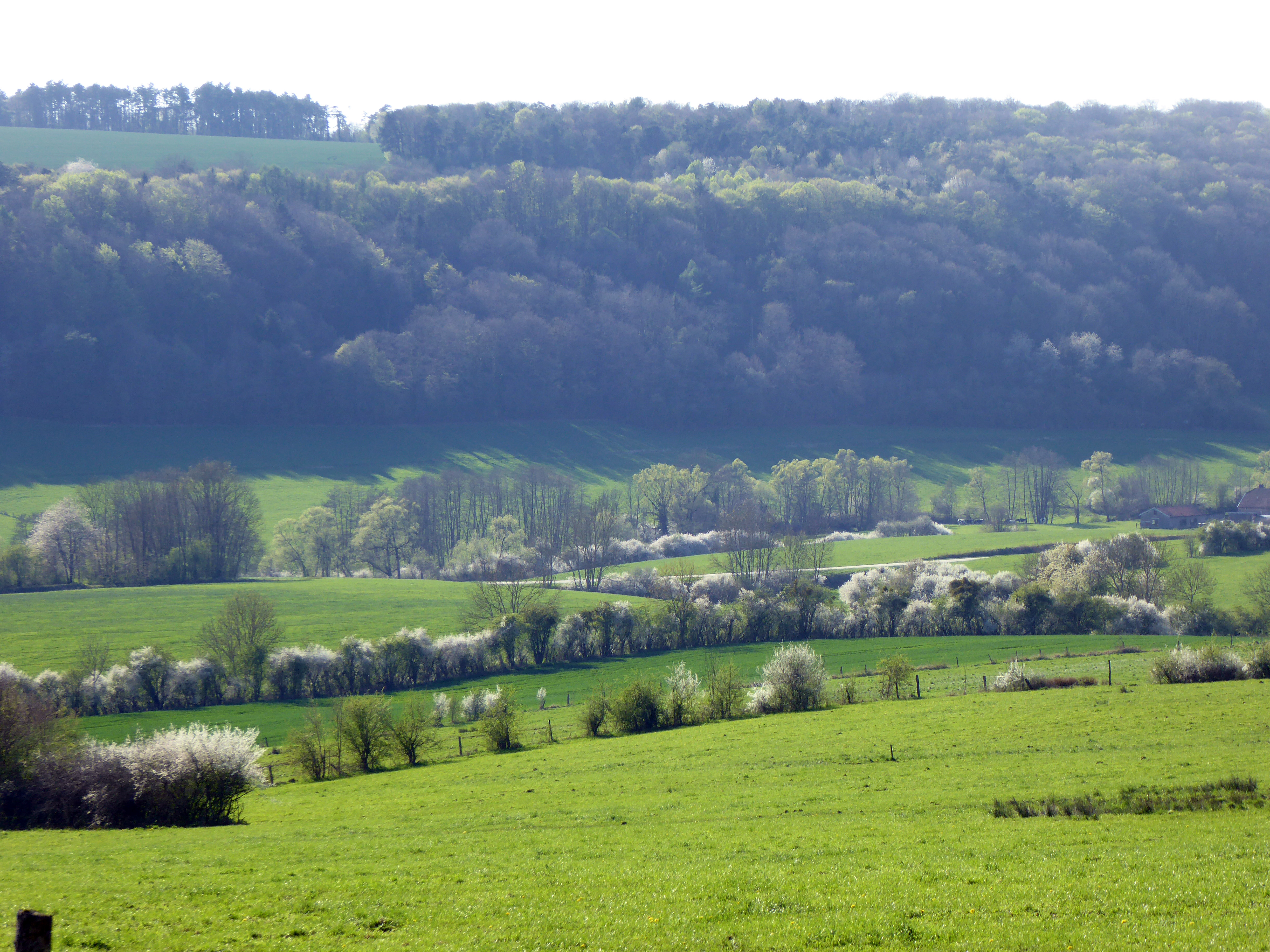 la vallée au printemps